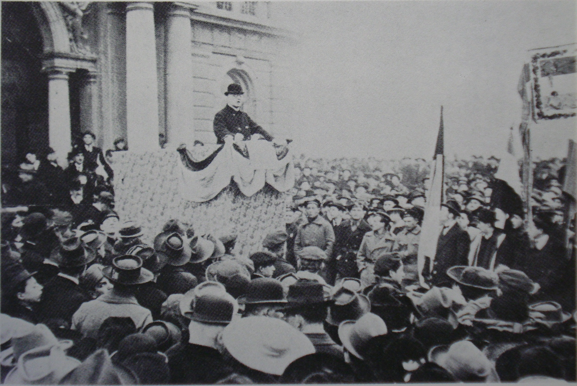 Ban Mihalovich govori ispred HNK, 22-10-1918